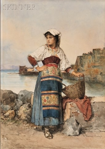 "Sul lungomare", acquerello e matita su carta, 54.3 x 96.8 cm., firmato, coll. privata